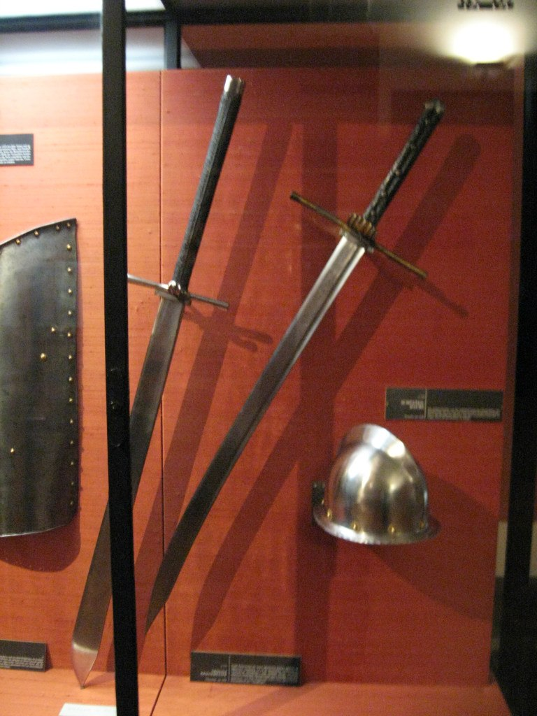 Großes Krieggsmesser из коллекции Hofjagd- und Rüstkammer Wien. Австрия, 1490 г.